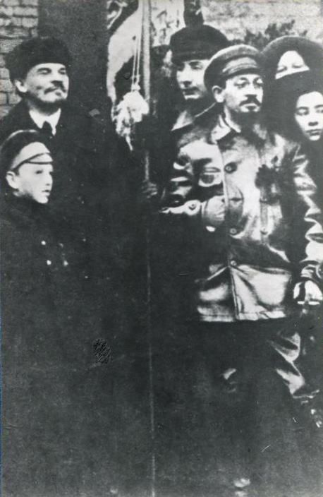 В.И. Ленин и Я.М. Свердлов на Красной площади у Кремлёвской стены во время демонстрации трудящихся, посвящённой первой годовщине Великой Октябрьской социалистической революции. 7 ноября 1918 года.